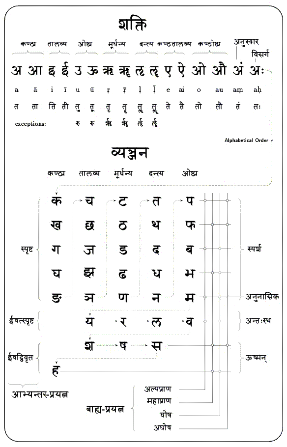 देवनागरी वर्णों के वर्गीकरण की तालिका